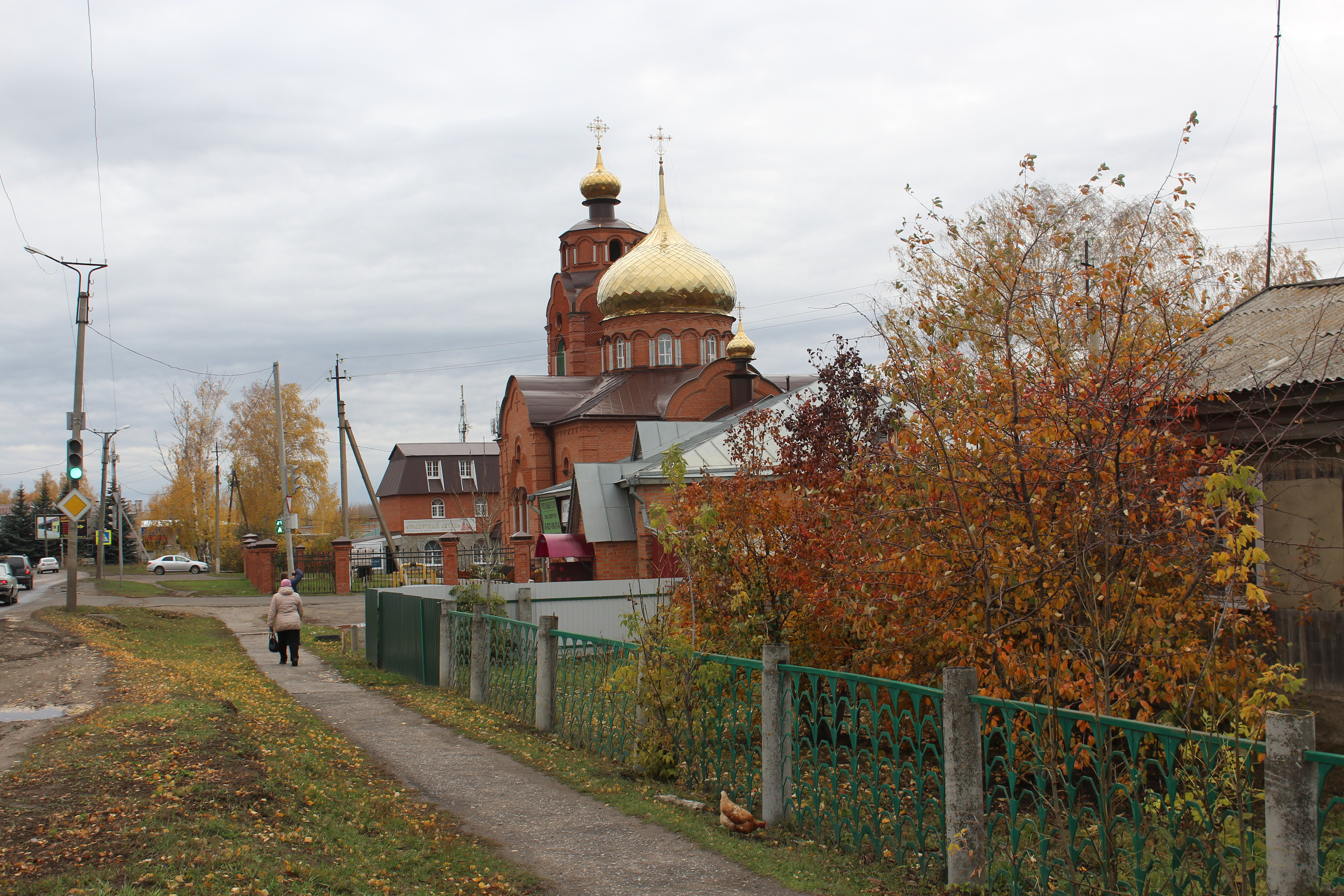 Вид храма с юго-восточной стороны